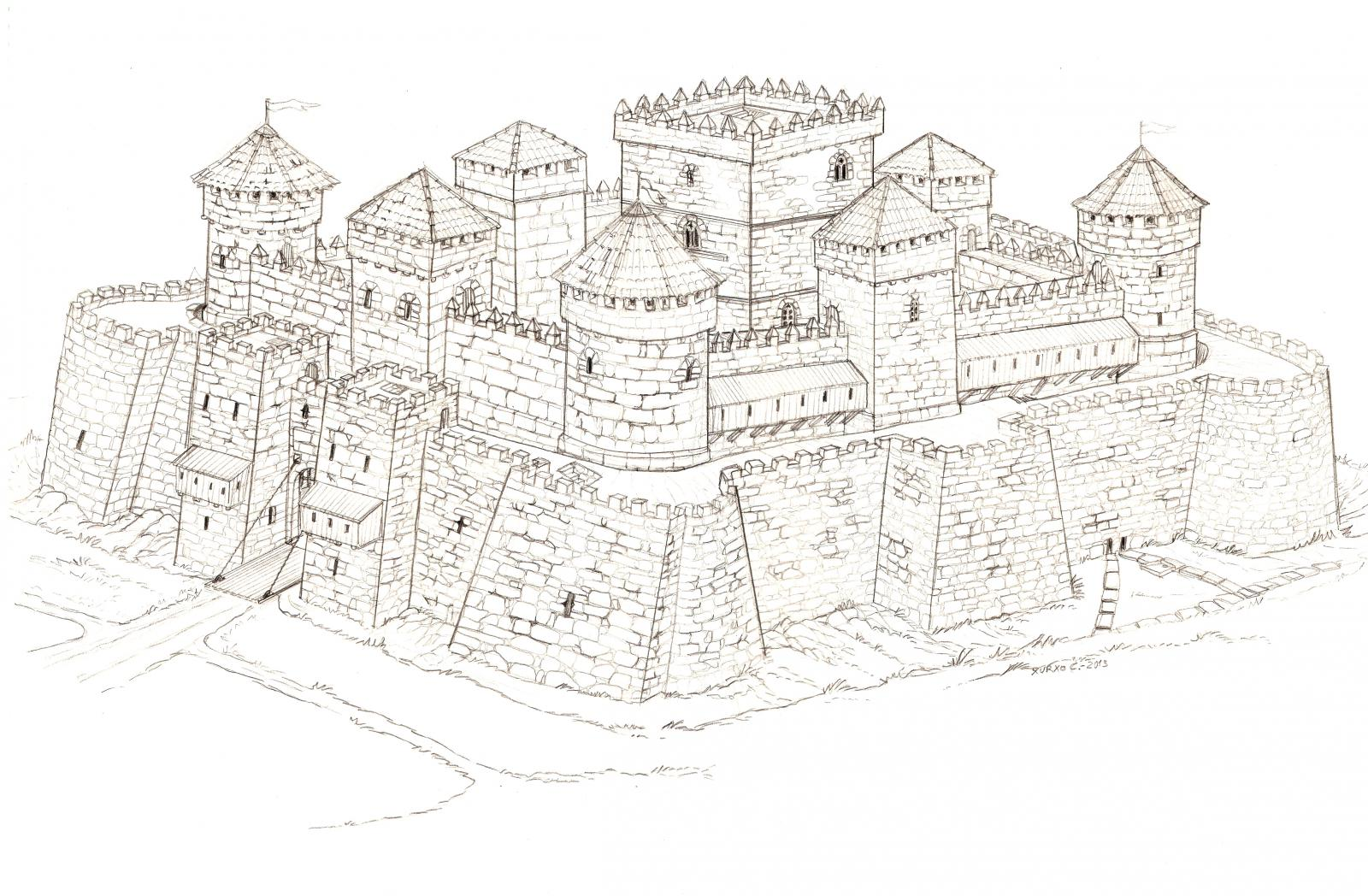 Posible reconstrución do castelo da Rocha Forte.